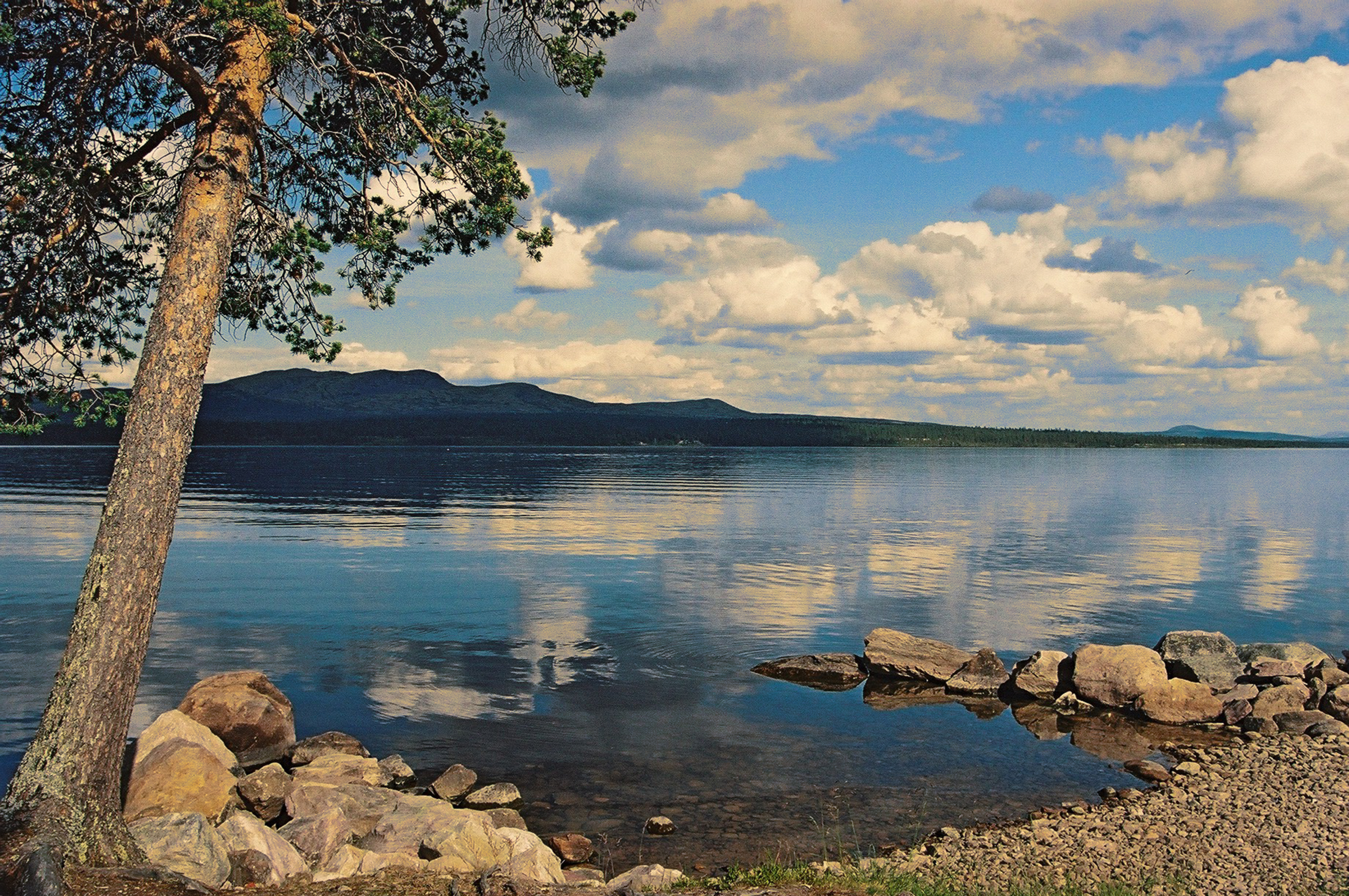 Sølensjøen i Rendalen kommune den 11.juli i 2005. Foto av Thor Helge Sømåen